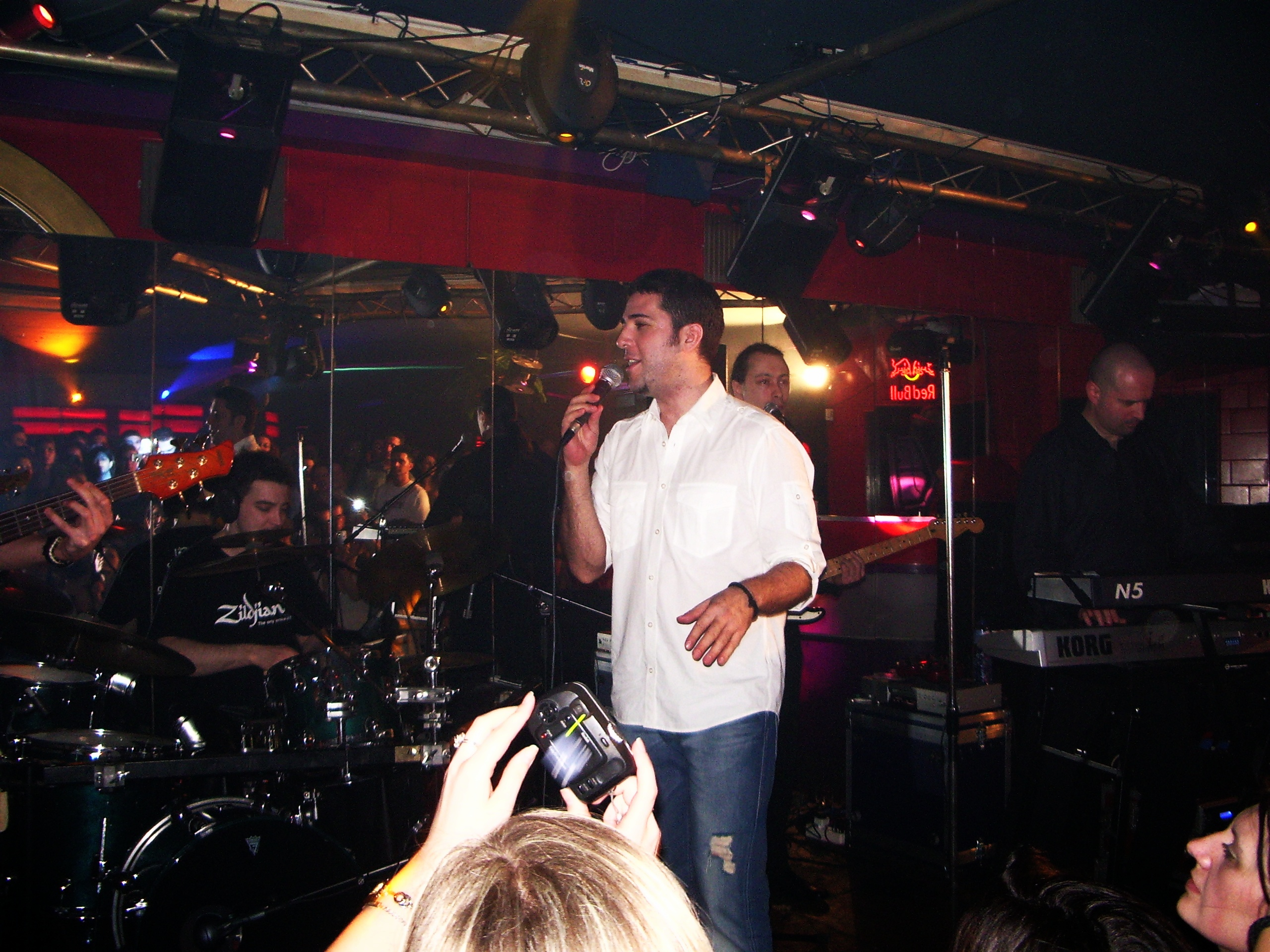 Željko Joksimović Moja slika!!!